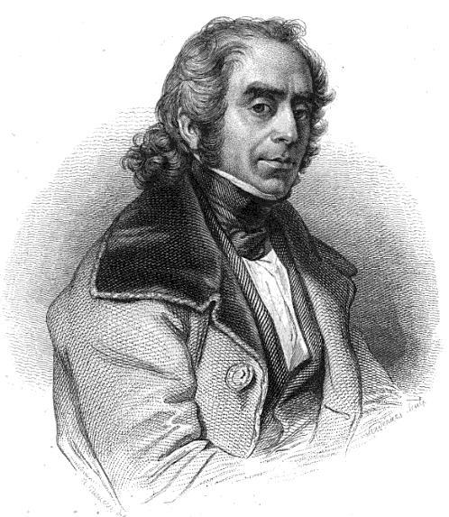 "Jacques Arago"